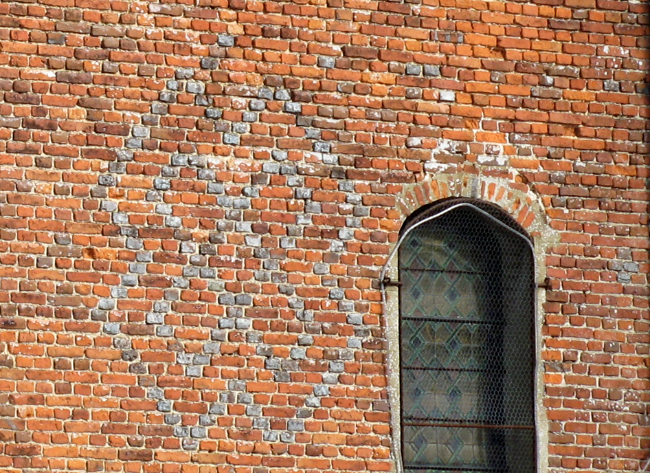 Lavaqueresse (Aisne, France) - L'église fortifiée. Motifs décoratifs en briques vitrifiées sur le côté Sud.